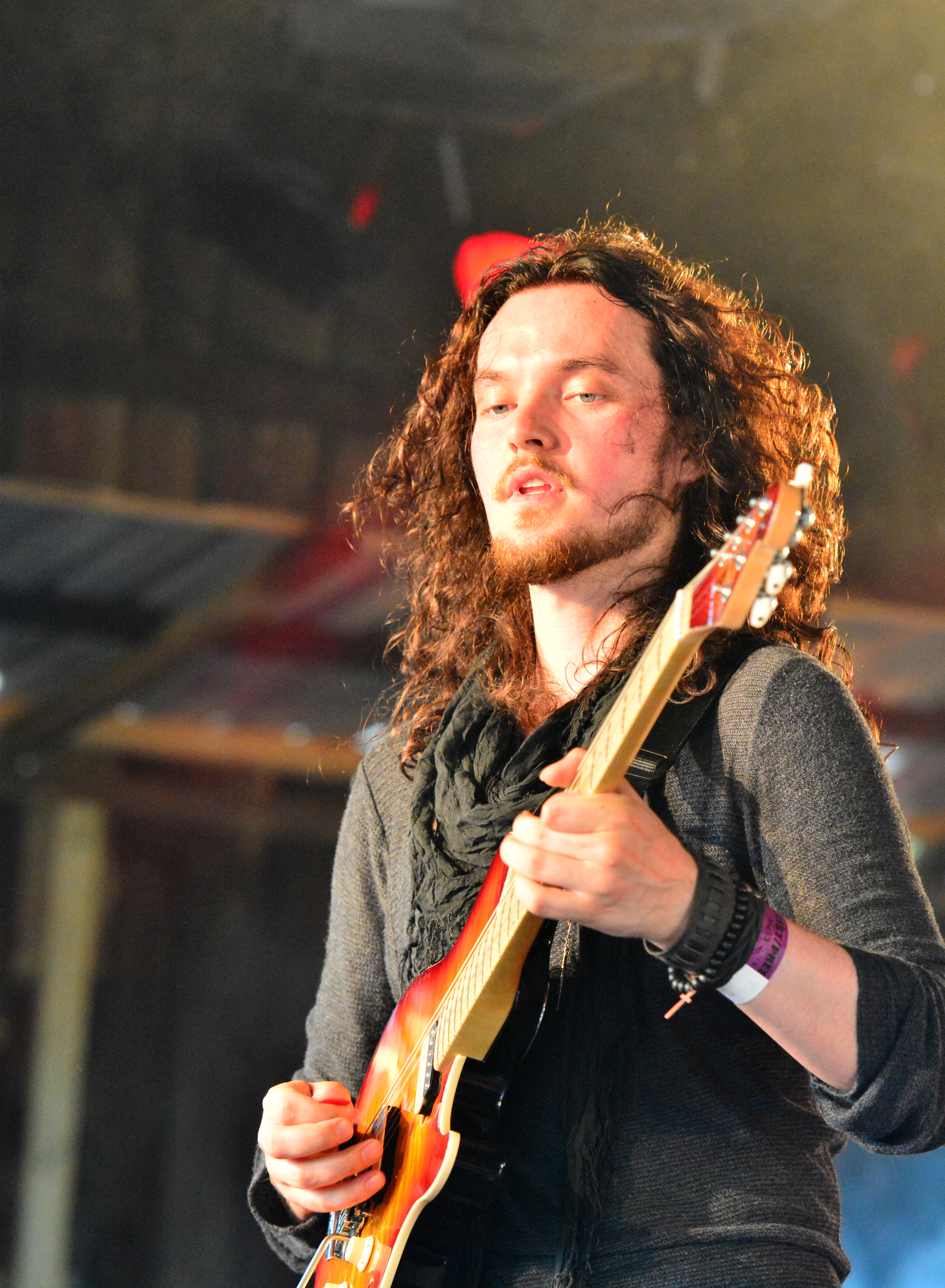 Dean Robertson von Tygers of Pan Tang beim Headbangers Open Air 2014